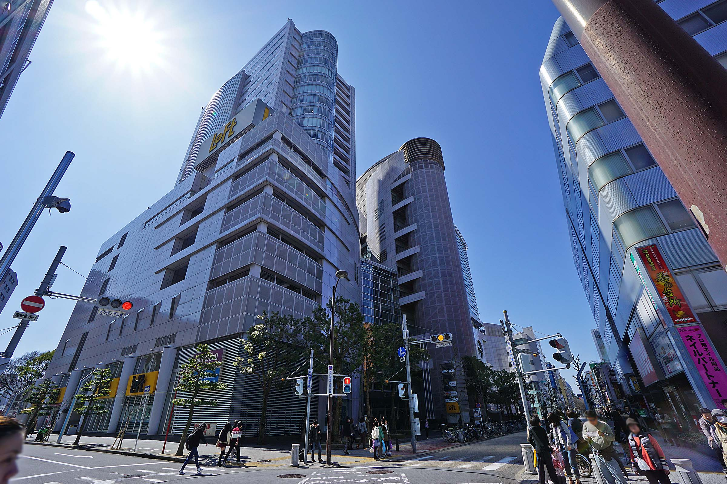 3 Chome Sakae, Naka-ku, Nagoya-shi, Aichi-ken 460-0008, Japan